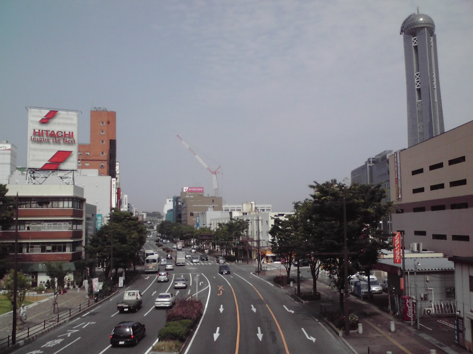 下関市豊前田町の様子